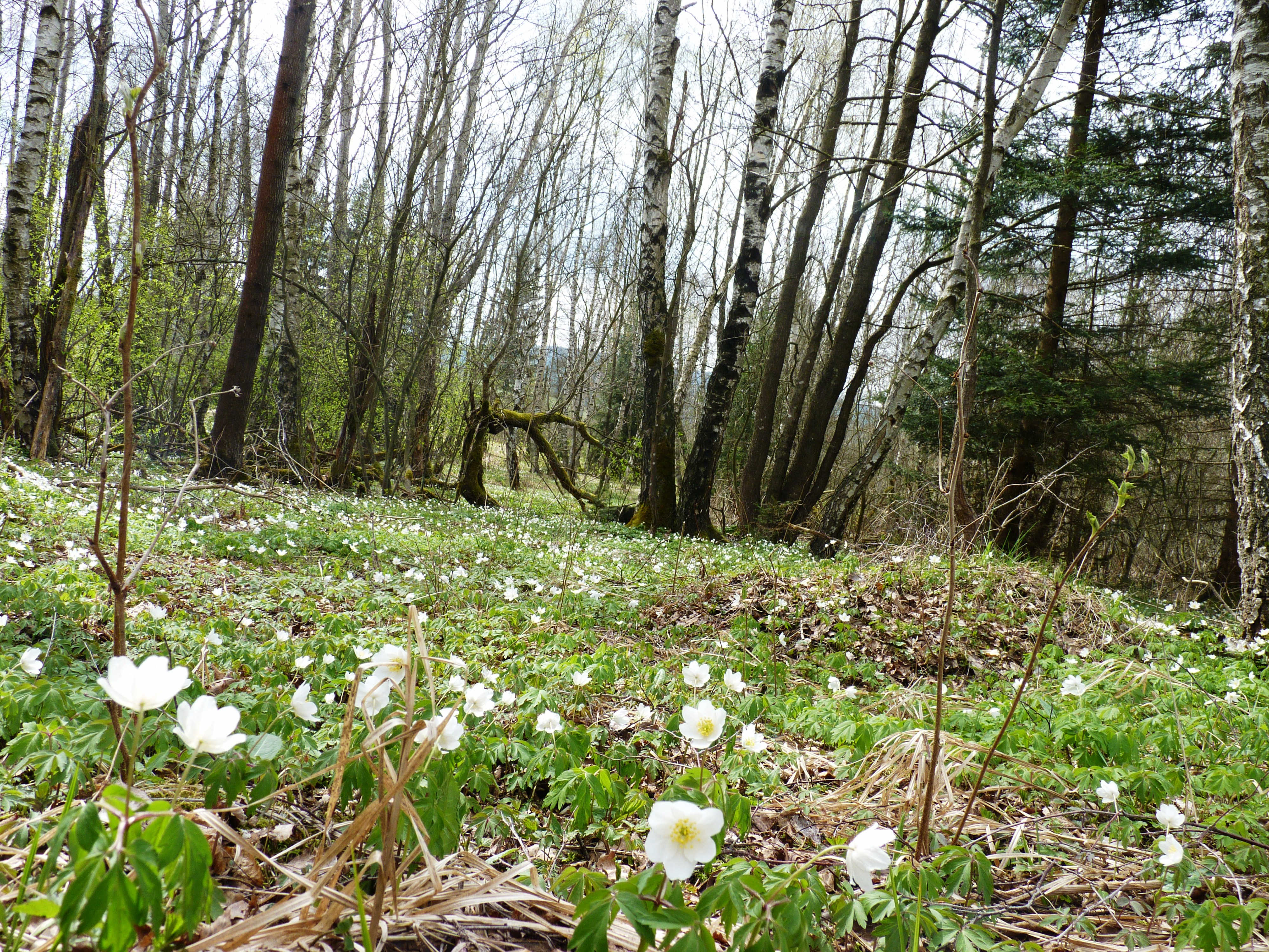 Přírodní rezervace Onen Svět.